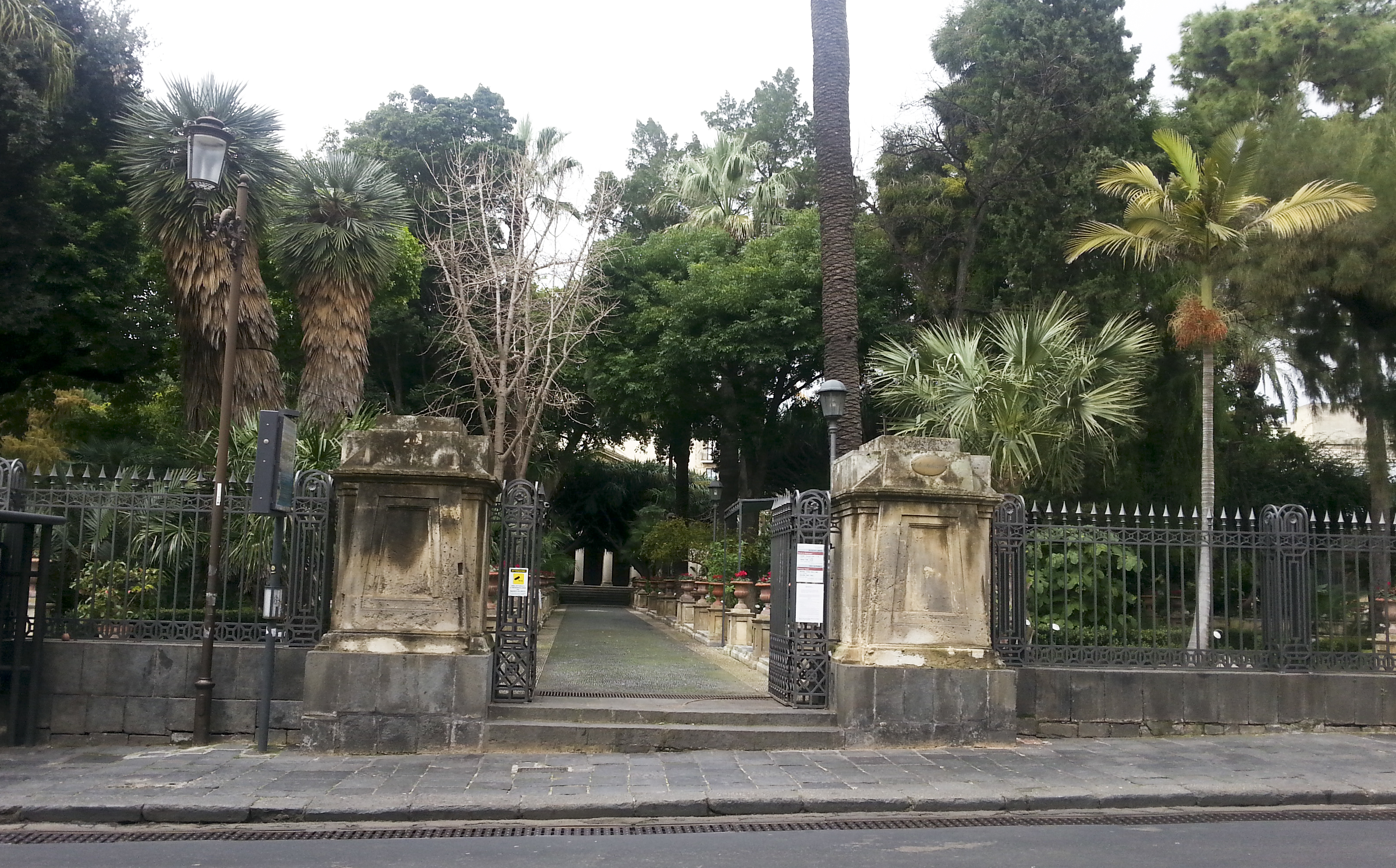 Orto botanico di CataniaIngresso principale